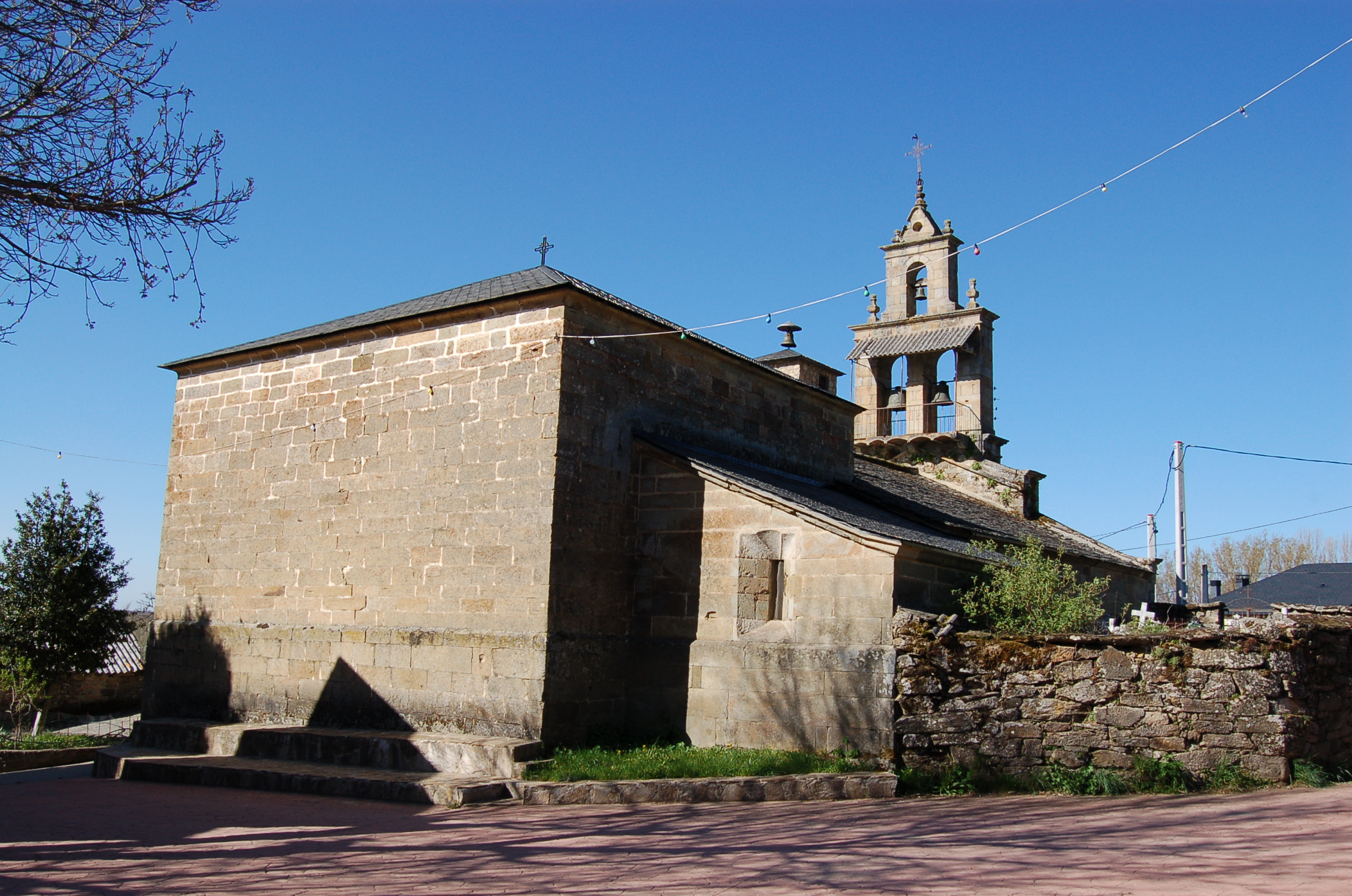 Igrexa parroquial de San Justo